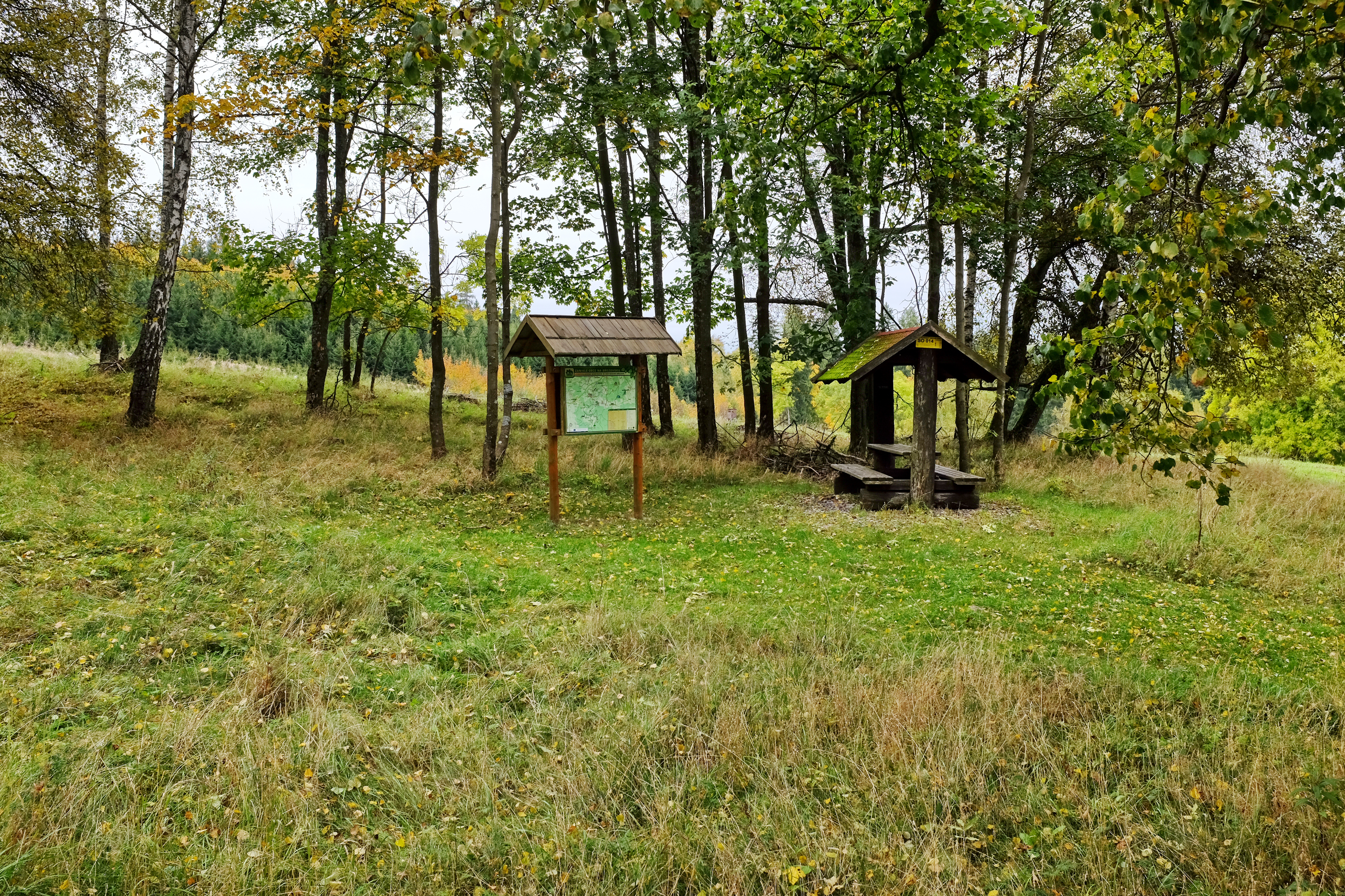 Týmov, zaniklá osada ve Slavkovském lese, infopanel v místě zaniklé osady, okres Sokolov